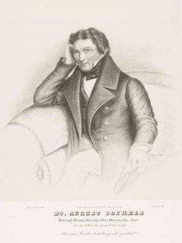 Portät des braunschweigischen Oberstabsarztes August Pockels (d. 1840)